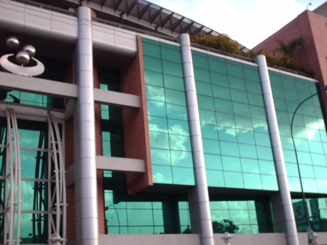 Vista de la entrada de Ciudad Banesco. Caracas-Venezuela